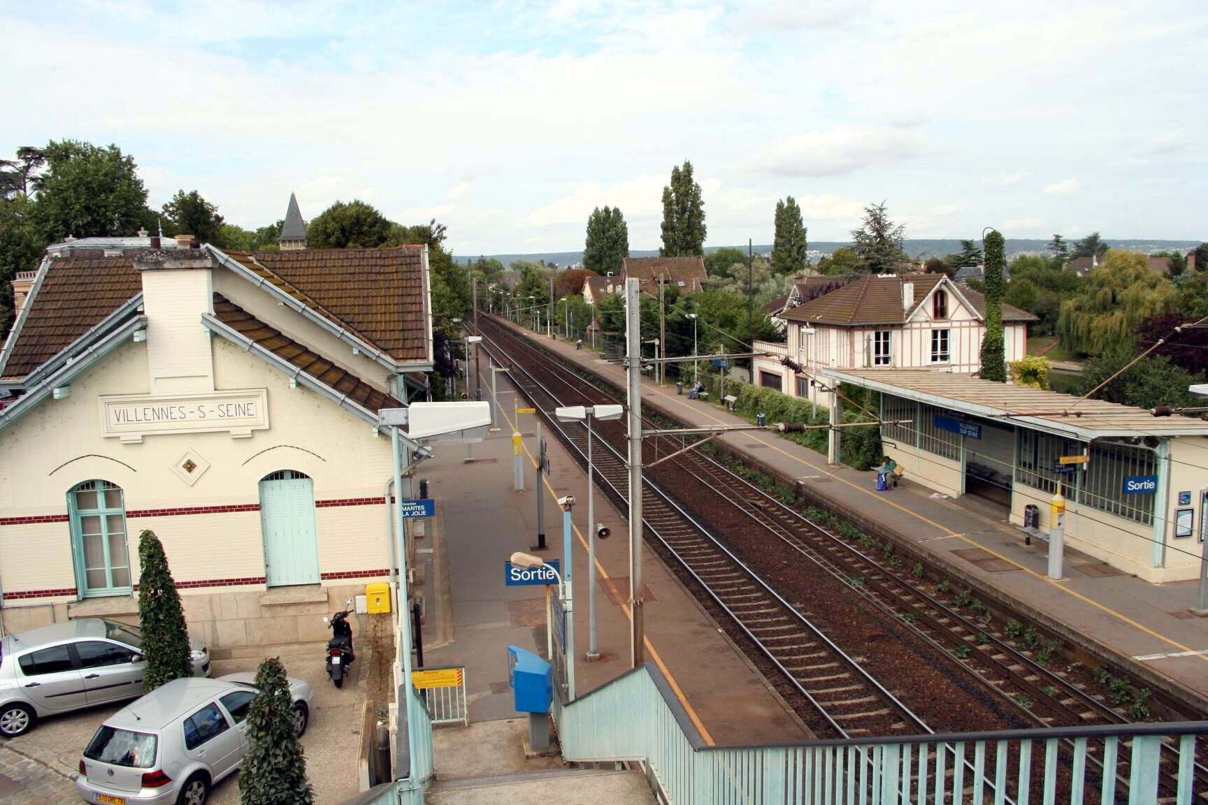 Gare de Villennes-sur-Seine - Yvelines (France)